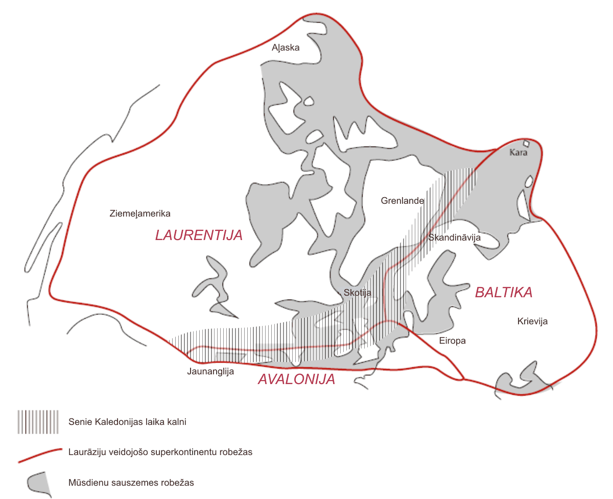 Tektoniskās plātnes Ziemeļjūrā.